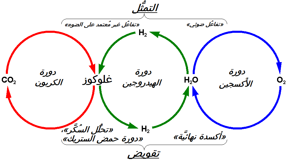 الترابُط بين دورات الكربون والهيدروجين والأُكسجين في عمليَّة التمثيل الغذائي لِلنباتات ذات التركيب الضوئي.